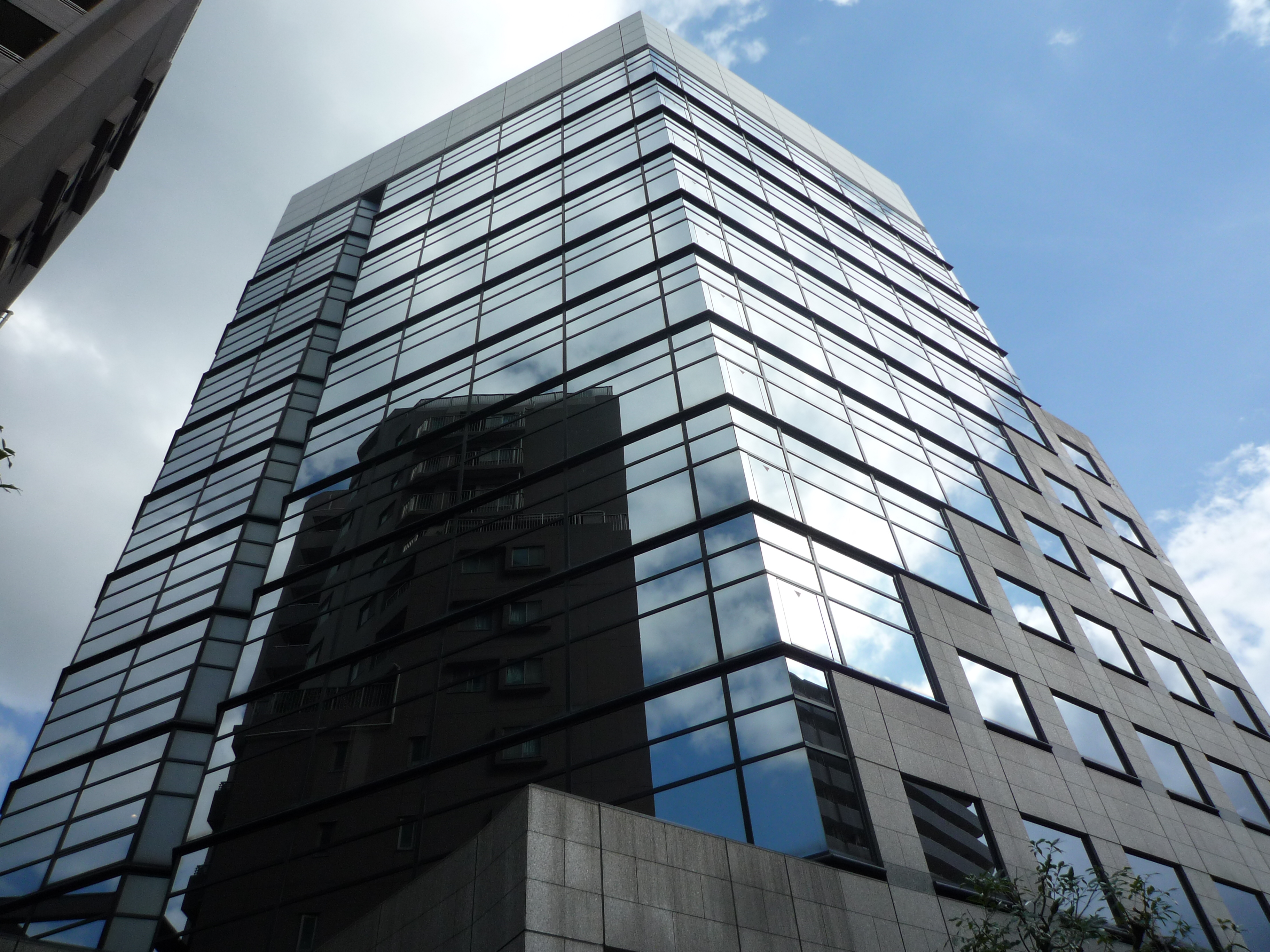 東京メトロ丸の内線新大塚駅前のSouth新大塚ビルを撮影したものです。